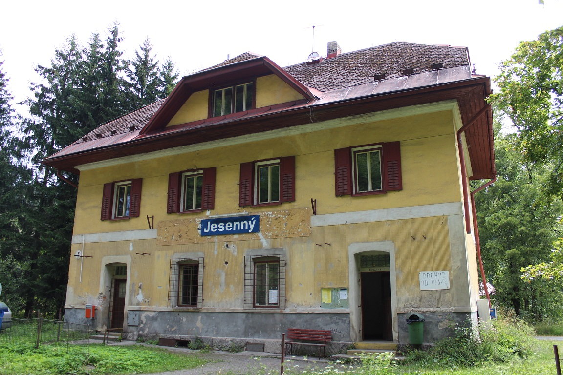 Železniční zastávka Jesenný